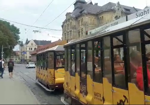 Tramway à Lviv